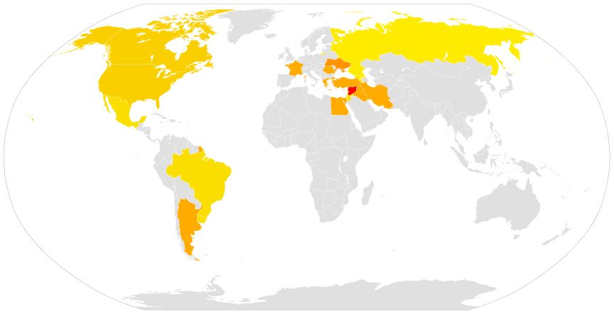 Países con jurisdicciones de la Iglesia Católica Armenia